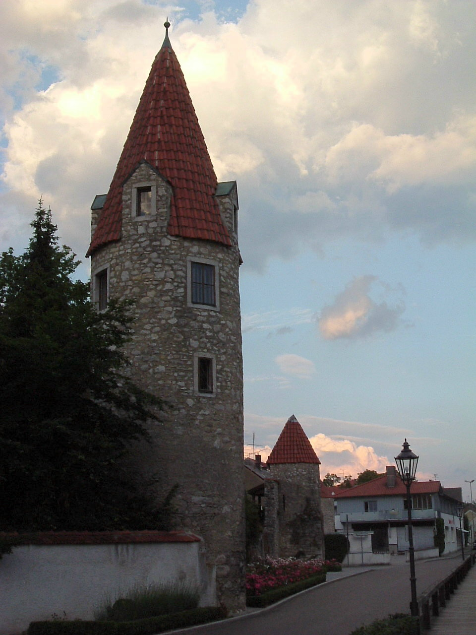 Abensberg - An der Abens, Maderturm, Juni 2004 Public Domain, eigene Aufnahme Möglichkeiten zur Lizenzierung, bitte die nicht-benötigte Variante aus dem Code löschen